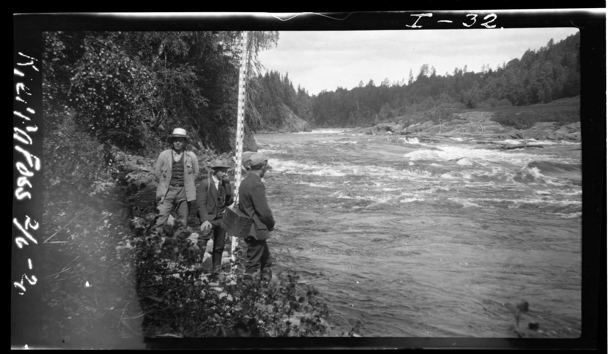 Heklafoss. Ca 1 km. nord-øst Styrvoll kirke. Hydrologisk avdeling. Dato: 02.06.1920.